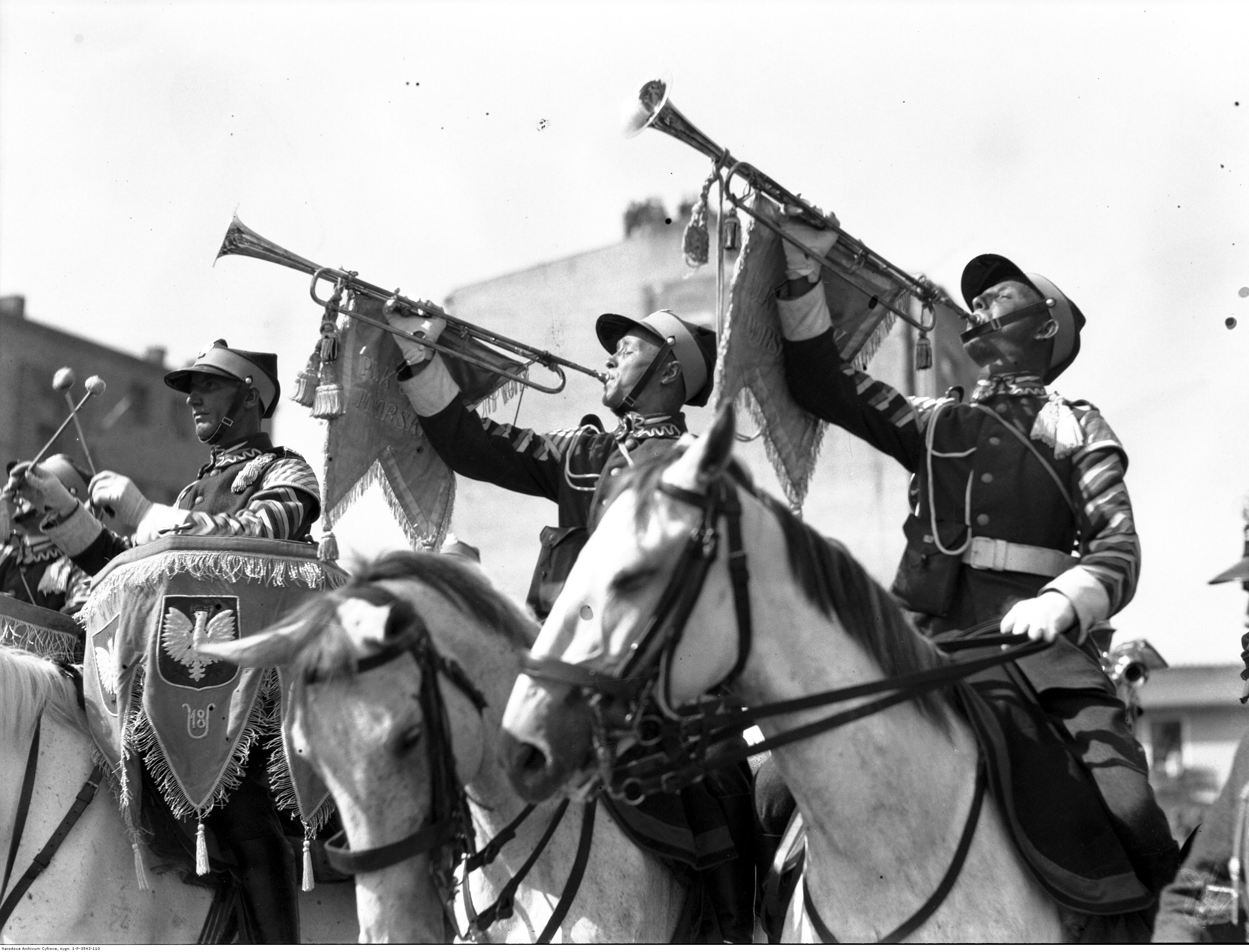 Obchody Święta Morza w Gdyni 31 lipca 1932. Orkiestra 18-go Pułku Ułanów Pomorskich podczas grania fanfar. Koncern Ilustrowany Kurier Codzienny - Archiwum Ilustracji. Sygnatura: 1-P-3543-110